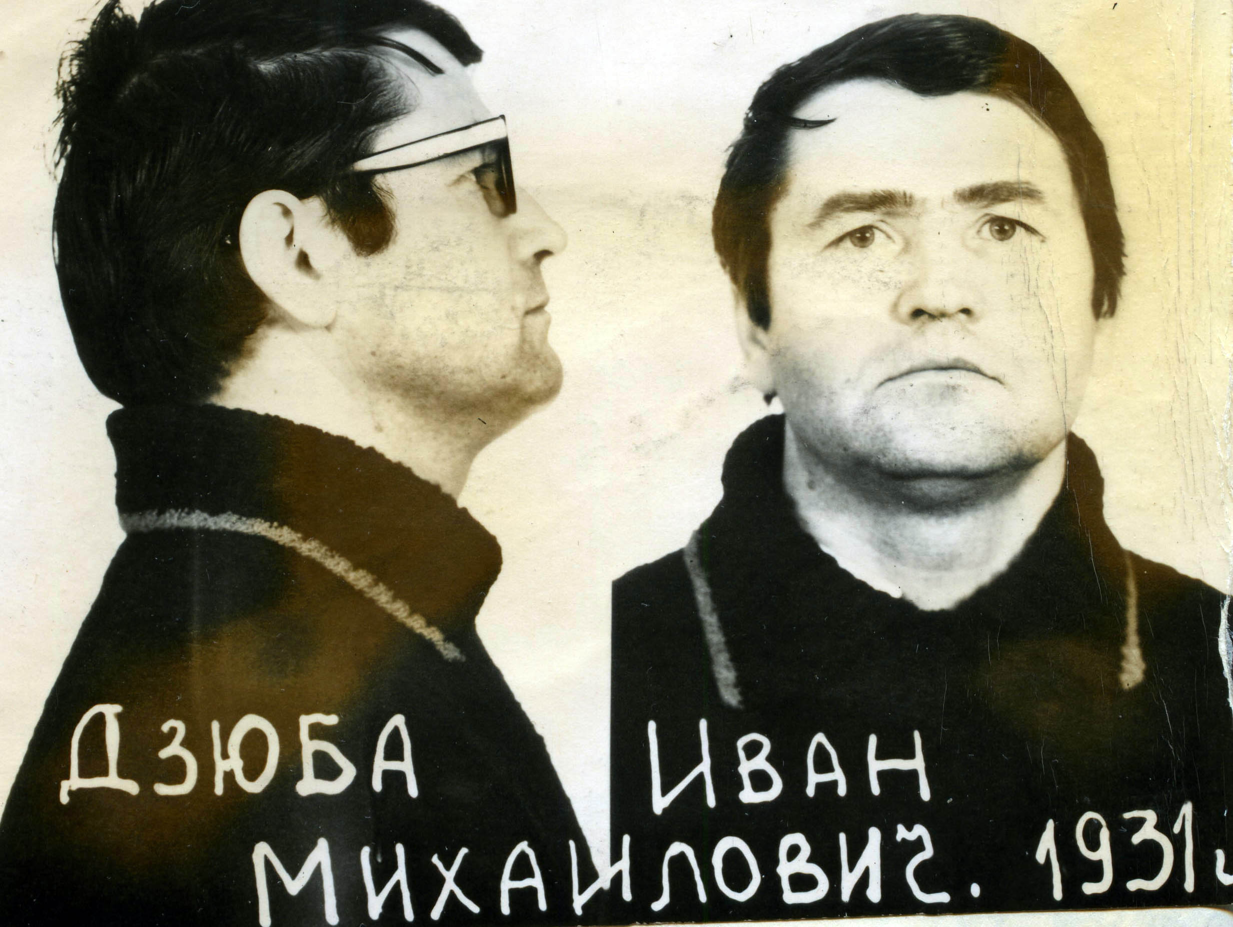 Офіційна світлина зроблена КДБ після арешту Івана Дзюби